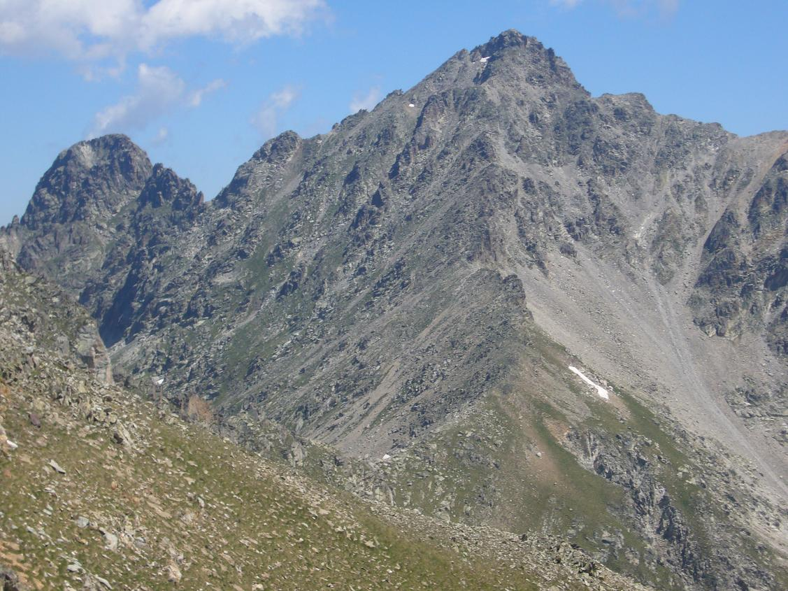 Pics de Subenuix vistos des de les Pales de Cubieso, la Torre de Cabdella, Pallars Jussà, Catalunya